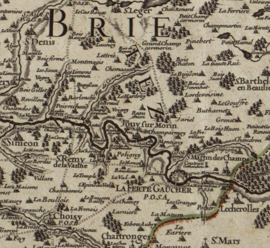 Extrait de la carte de l'Evesché de Meaux à la fin du XVII° Siècle.